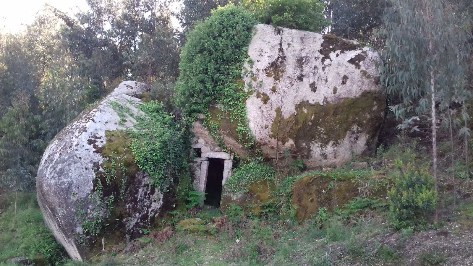 Estado actual do penedo